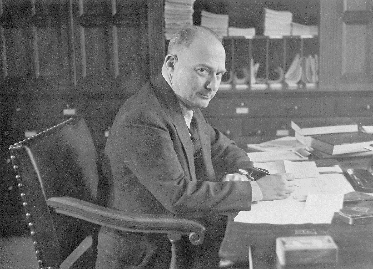 Helmuth Plessner aan zijn bureau in Groningen, 1939.